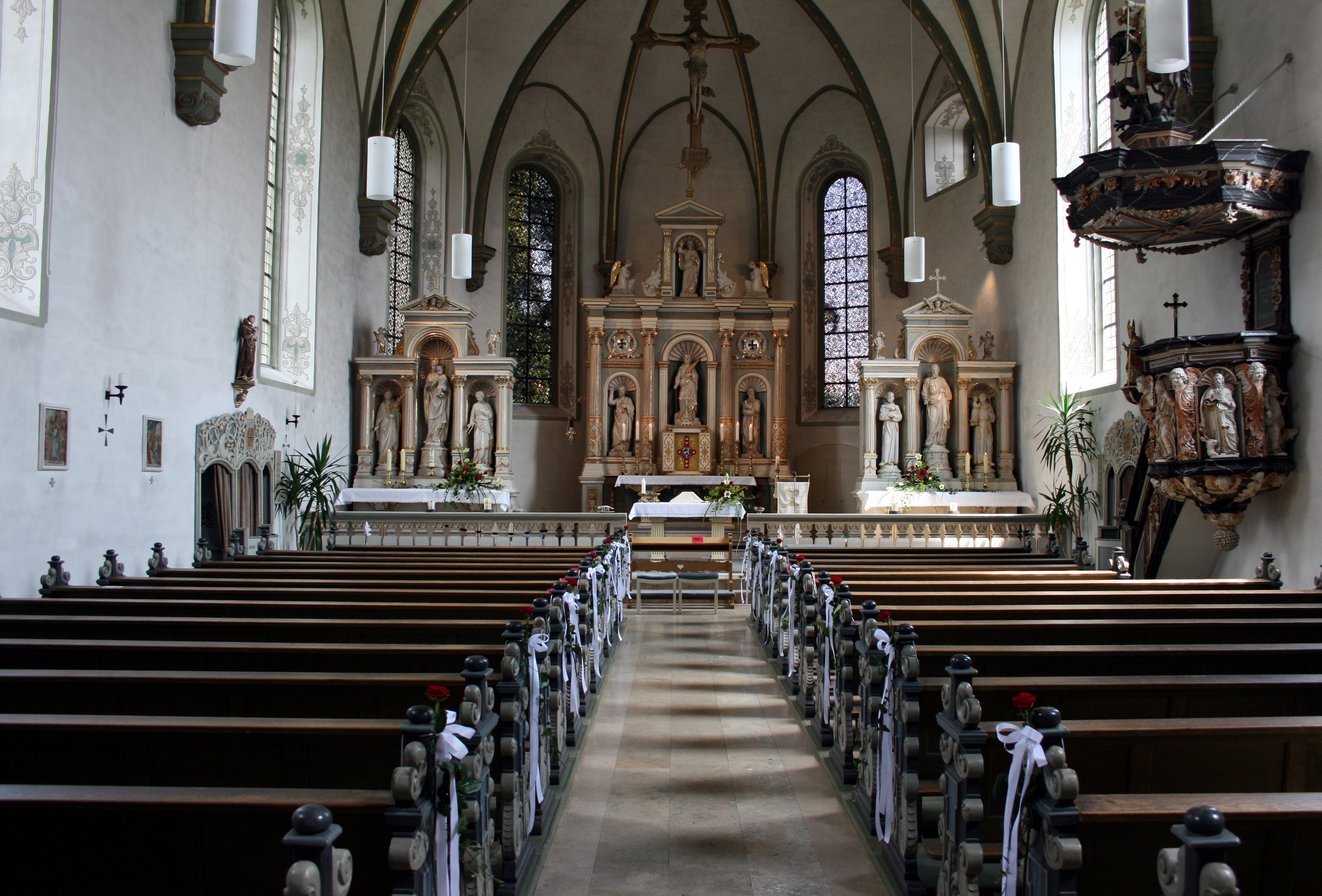 Blick in den Innenraum der Pfarrkirche.